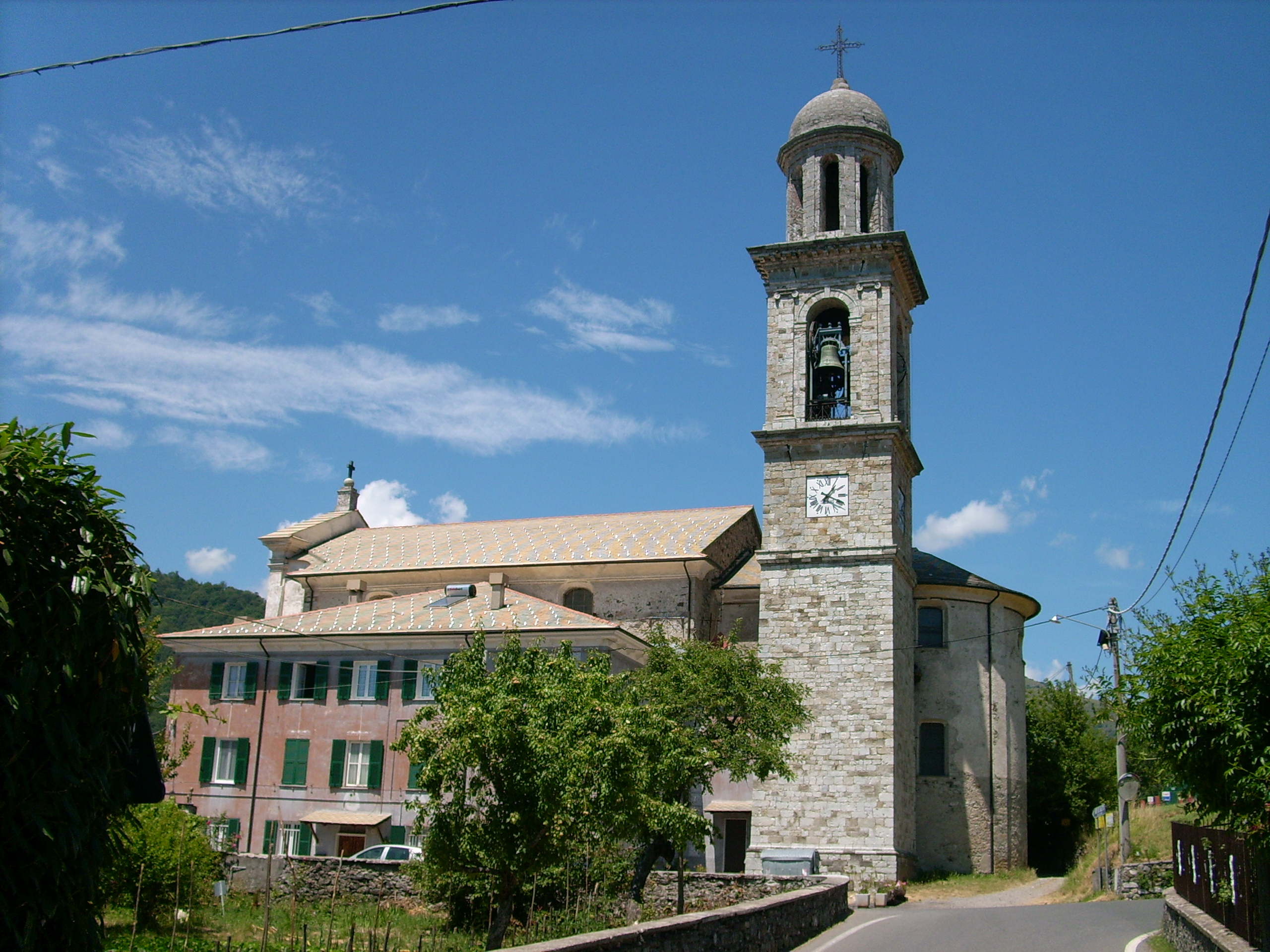 Chiesa di san Giovanni Battista di Rovegno, Liguria, Italia